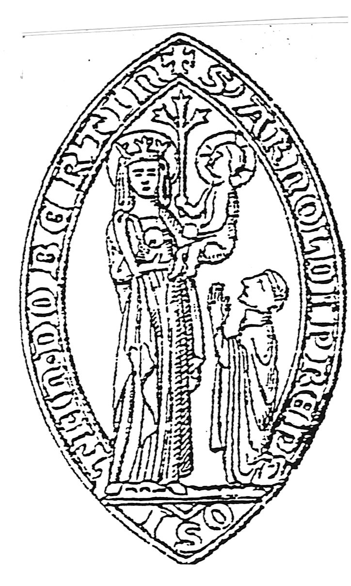 Kleines parabolisches Geschäftssiegel des Dobbertiner Klosterprobstes Arnold.